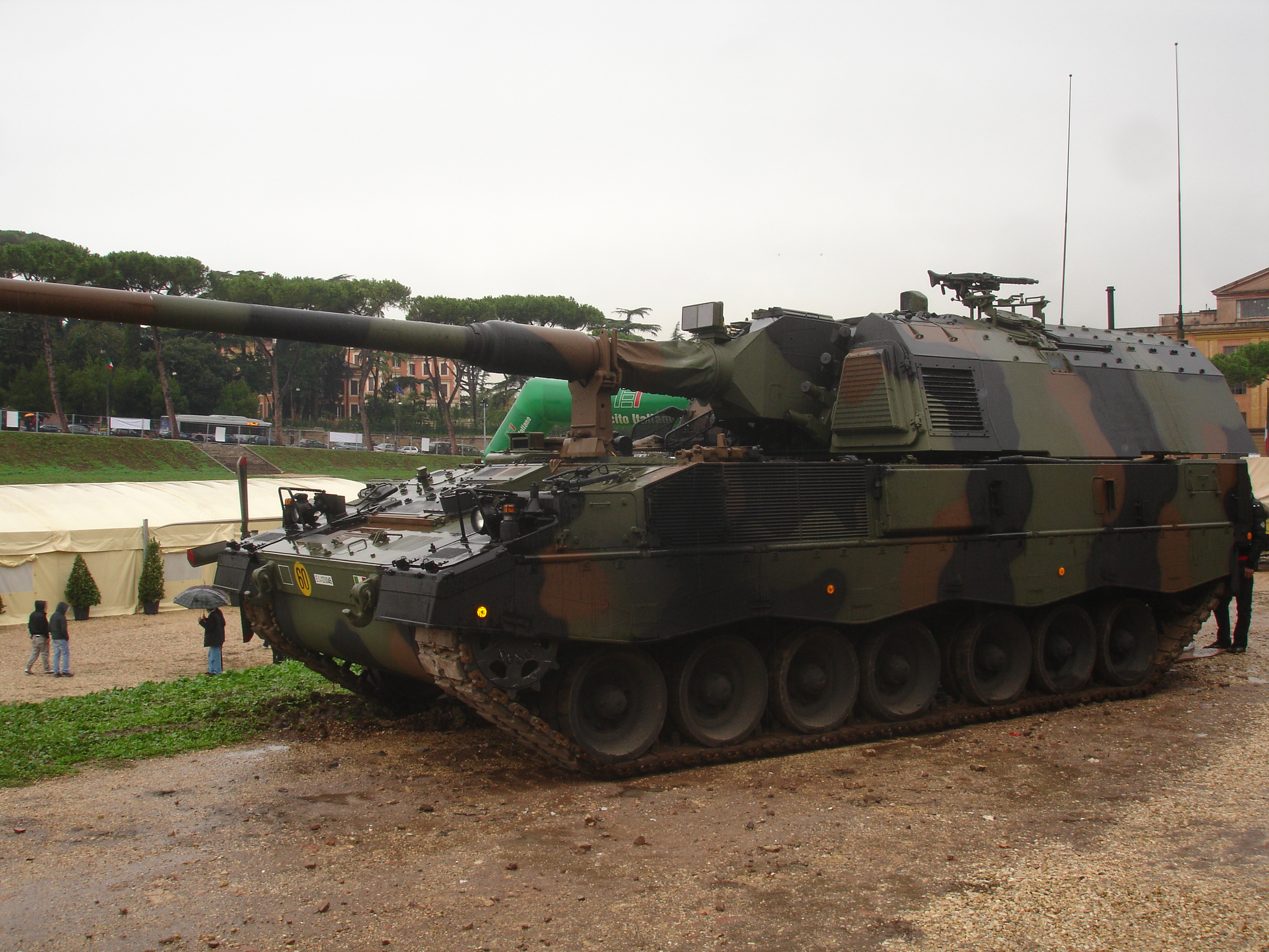 semovente di artiglieria esposto a Roma.